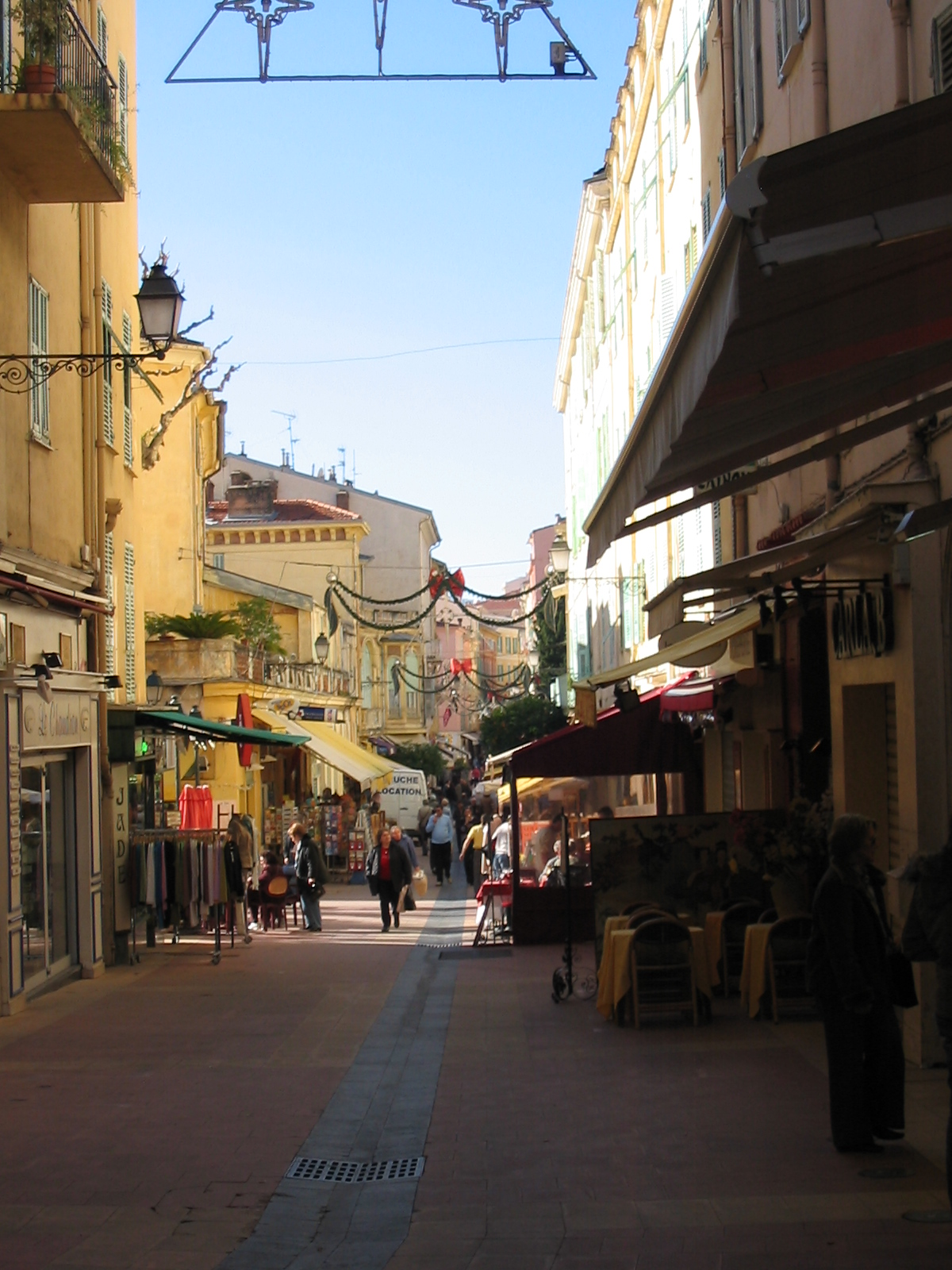 Aspects d'une rue de Menton (Alpes-Maritimes). je suis l'auteur du cliché pris en janvier 2006.